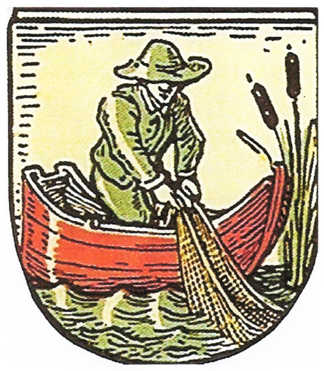 Wappen der ehemaligen Gemeinde Flecken Zechlin, Land Brandenburg